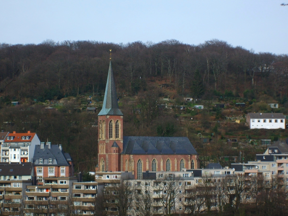 Sankt Josph, Wuppertal, Ansicht von Süden